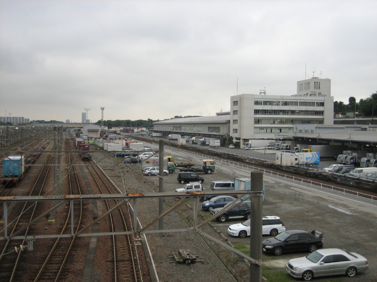 跨線橋から横浜羽沢駅を望む